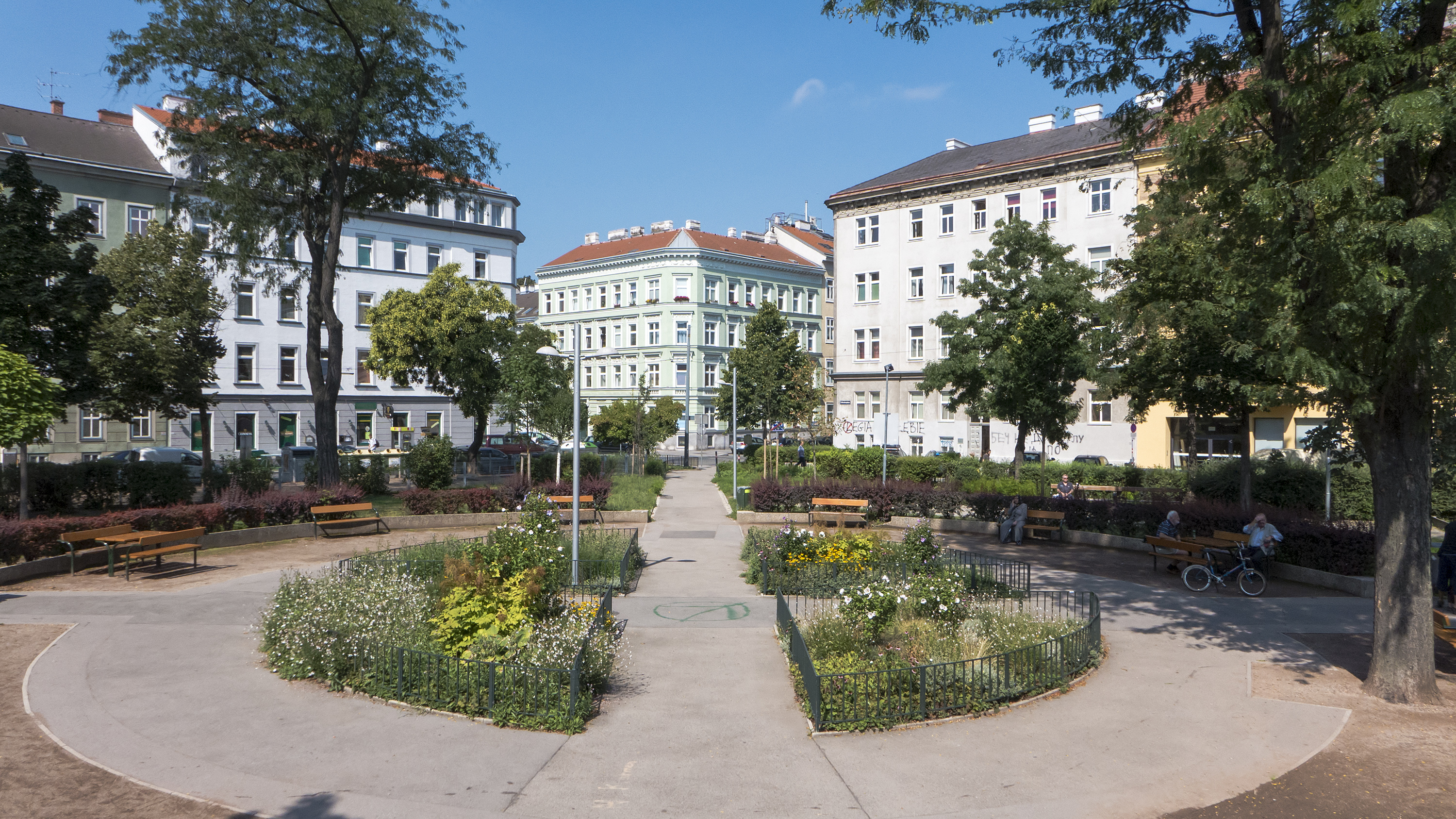 Bacherpark in Wien 5